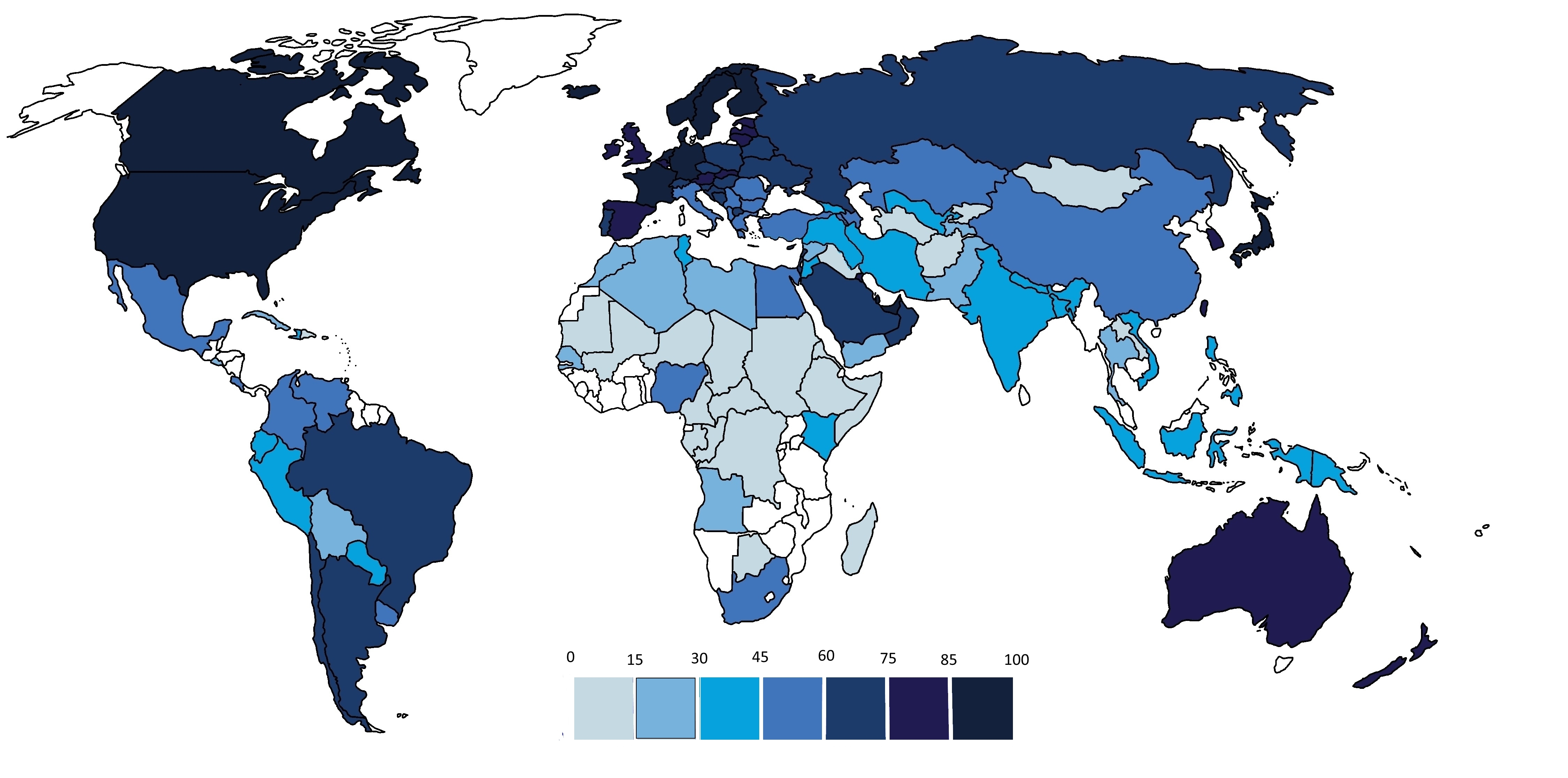 Kurdî: înternet